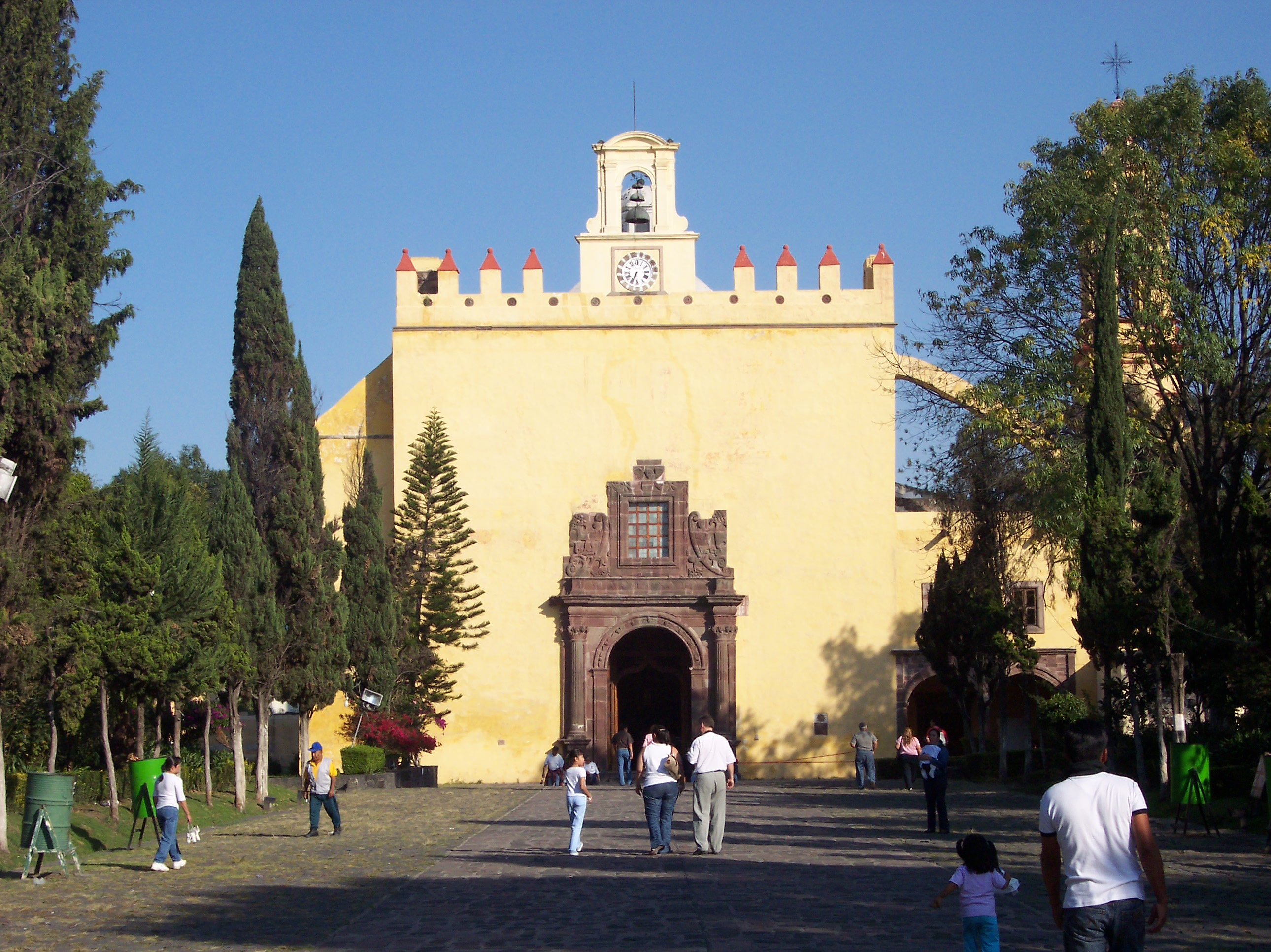 Templo y Exconvento de San Bernardino. Photo taken in Xochimilco, D. F. Mexico. SPANISH: Fotos tomadas en Xochimilco.